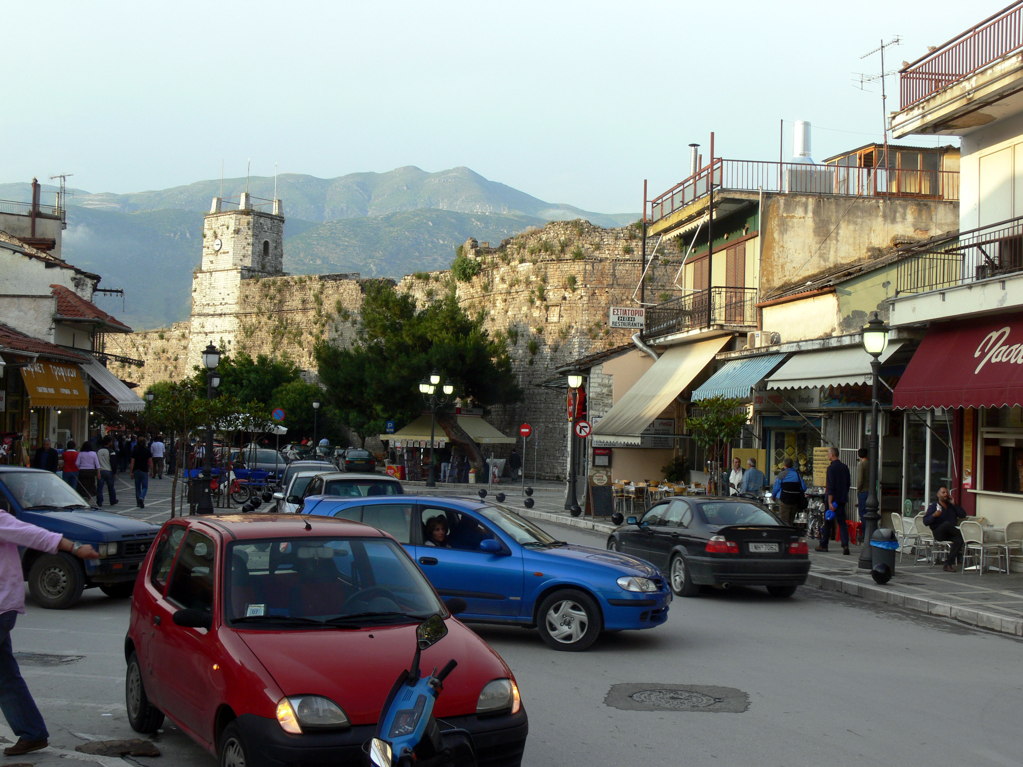 Kastro von Joannina